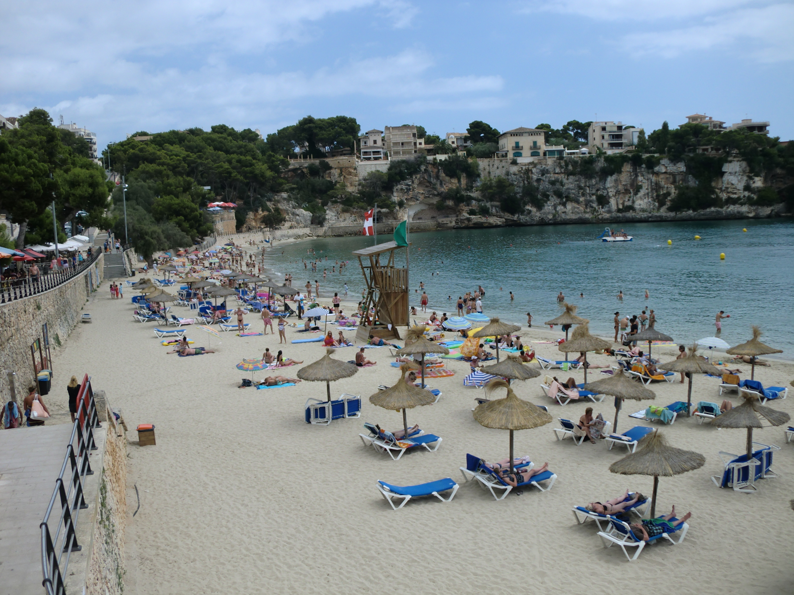 Strand von Port de Portocristo auf Mallorca